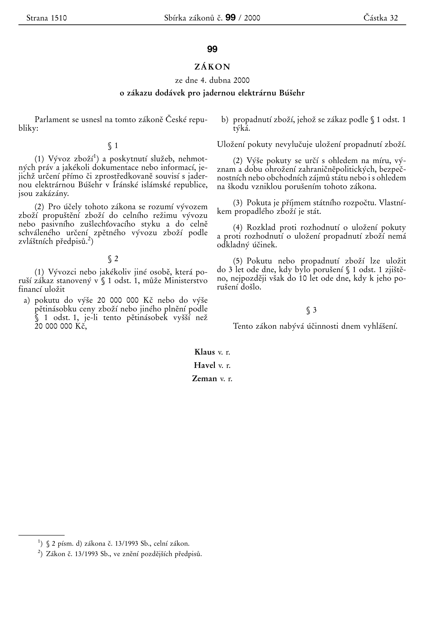 «Sbírky zákonů, částka 932, ročník 2000» Předpis č. 99/2000 Sb. Zákon o zákazu dodávek pro jadernou elektrárnu Búšehr.